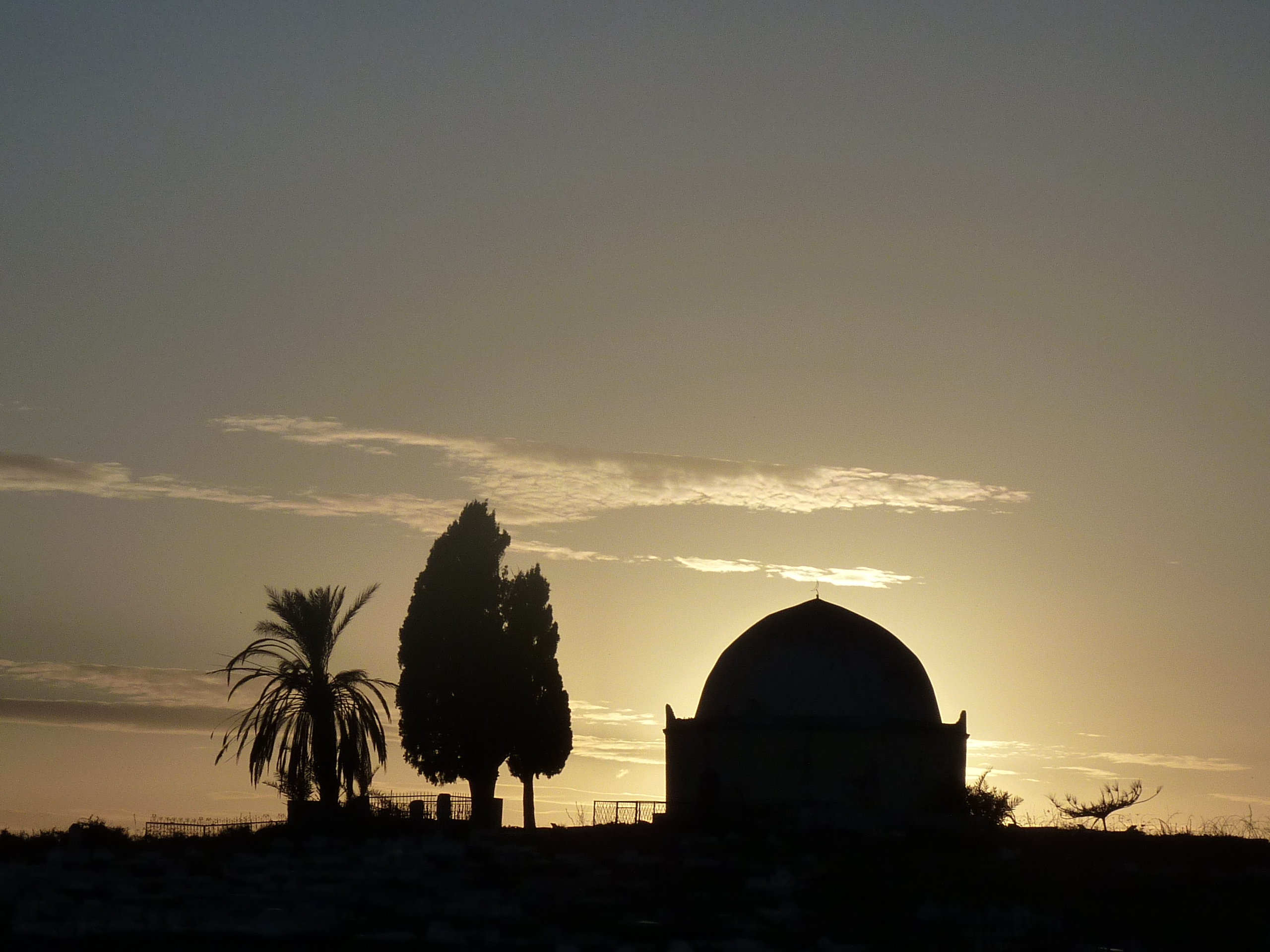 Mausolée de Sidi Belkacem Chebbi - Boumaïza Skikda (Algérie)